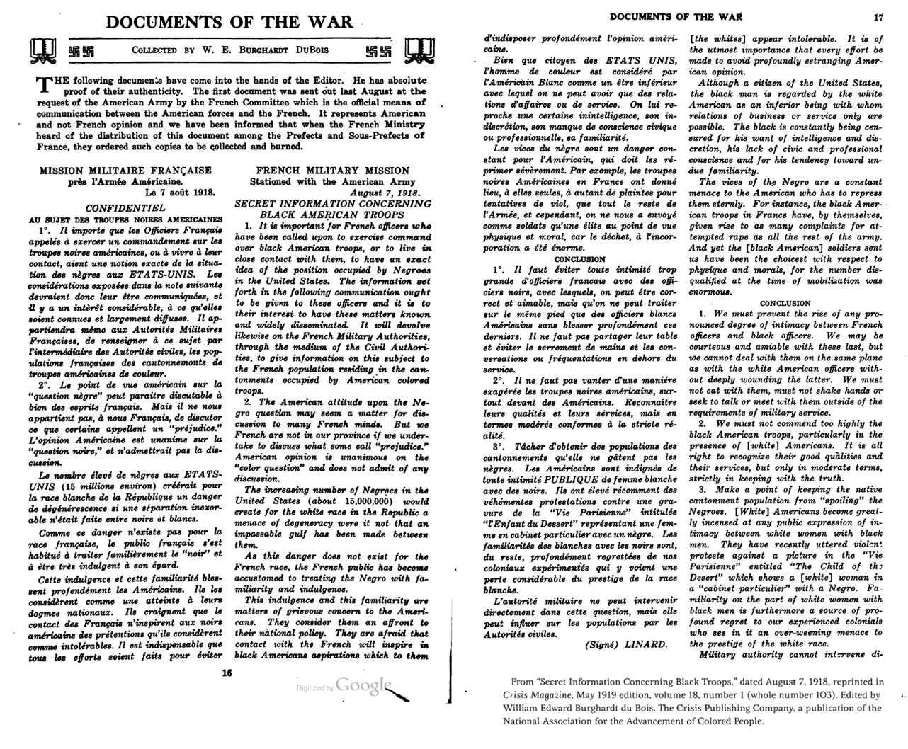 Le document original Linard, Mission militaire française près l’Armée Américaine - Au sujet des troupes noires américaines, (dit Circulaire Linard), daté du 7 août 1918, a été rédigé en français, avec la mention "Confidentiel", sous l'objet "Au sujet des troupes noires américaines". The Crisis, Vol. 58, n° 3, mars 1951, page 176, révèle le document en mars 1951 et en donne une traduction en anglais pour son lectorat aux Etats-Unis d'Amérique.